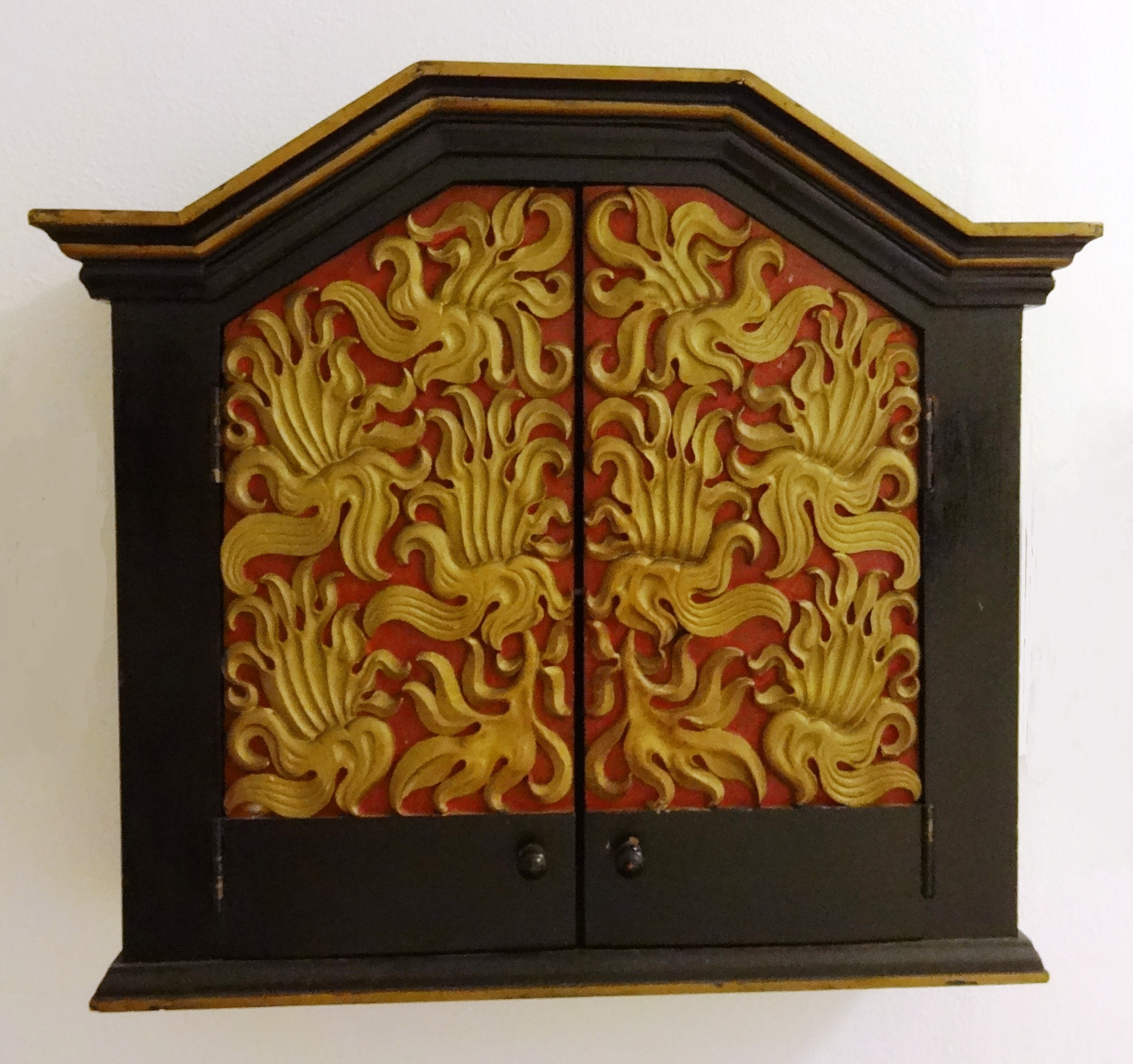 Litet väggskåp i barockstil tillverkat av Gustaf de Vylder ca. år 1900. Utfört i invändigt och utvändigt i oljefärg målat trä med en invändig centralt placerad hylla. Mått ca. 60x50x20cm. I dag (2016) i broderns barnbarns barnbarns ägo i Moçambique.